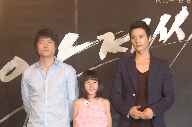 영화 아저씨